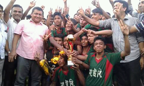 Football champion Manikpur High School